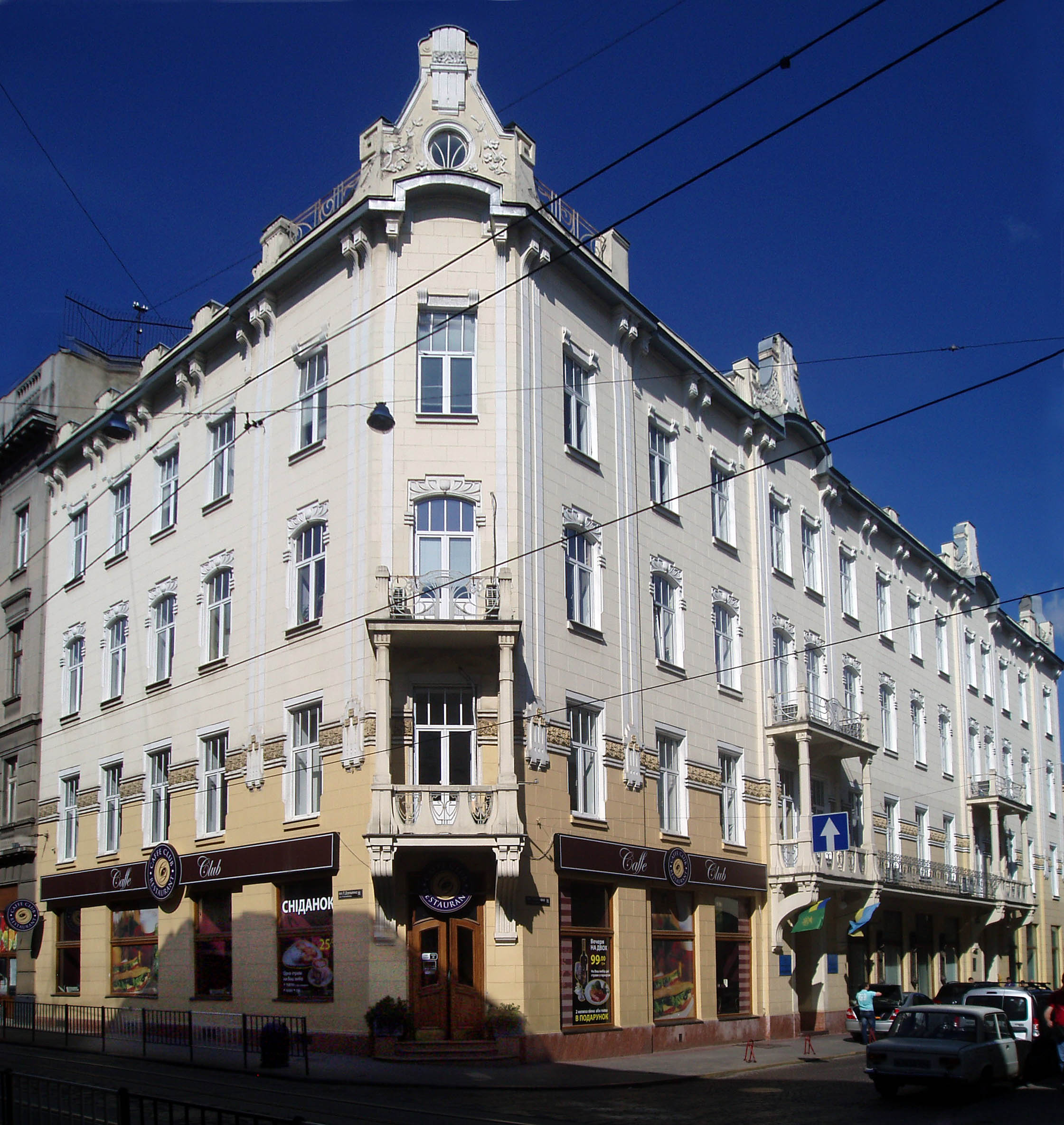 Будинок № 20 на вулиці Дорошенка (друга адреса - вулиця Костюшка, 1) у Львові. Архітектор Тадеуш Обмінський (1874-1932)